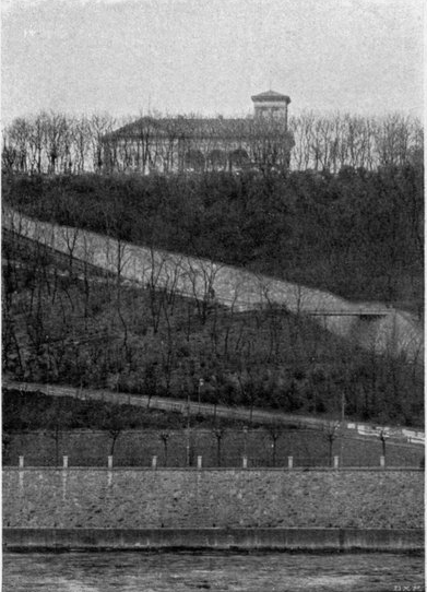 Zářez Lanové dráhy na Letnou na přelomu 19. a 20. století